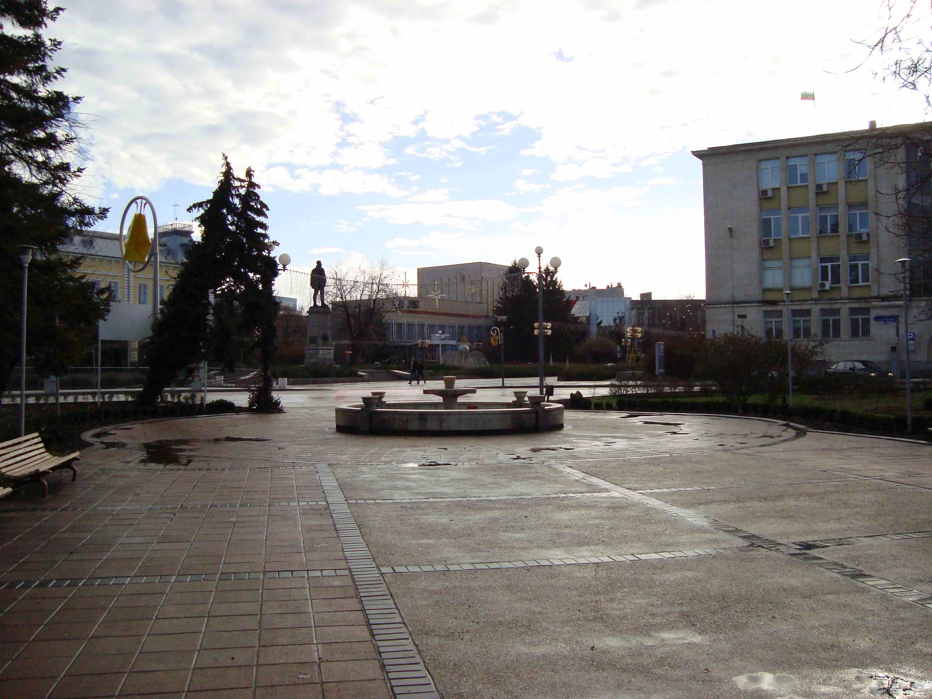 Центърът на Силистра (откъм Дунавската градина): паметник на Дочо Михайлов (в средата) с Драматично-кукления театър "Сава Доброплодни" зад него, Художествената галерия (отляво), административната сграда на Община Силистра (отдясно)